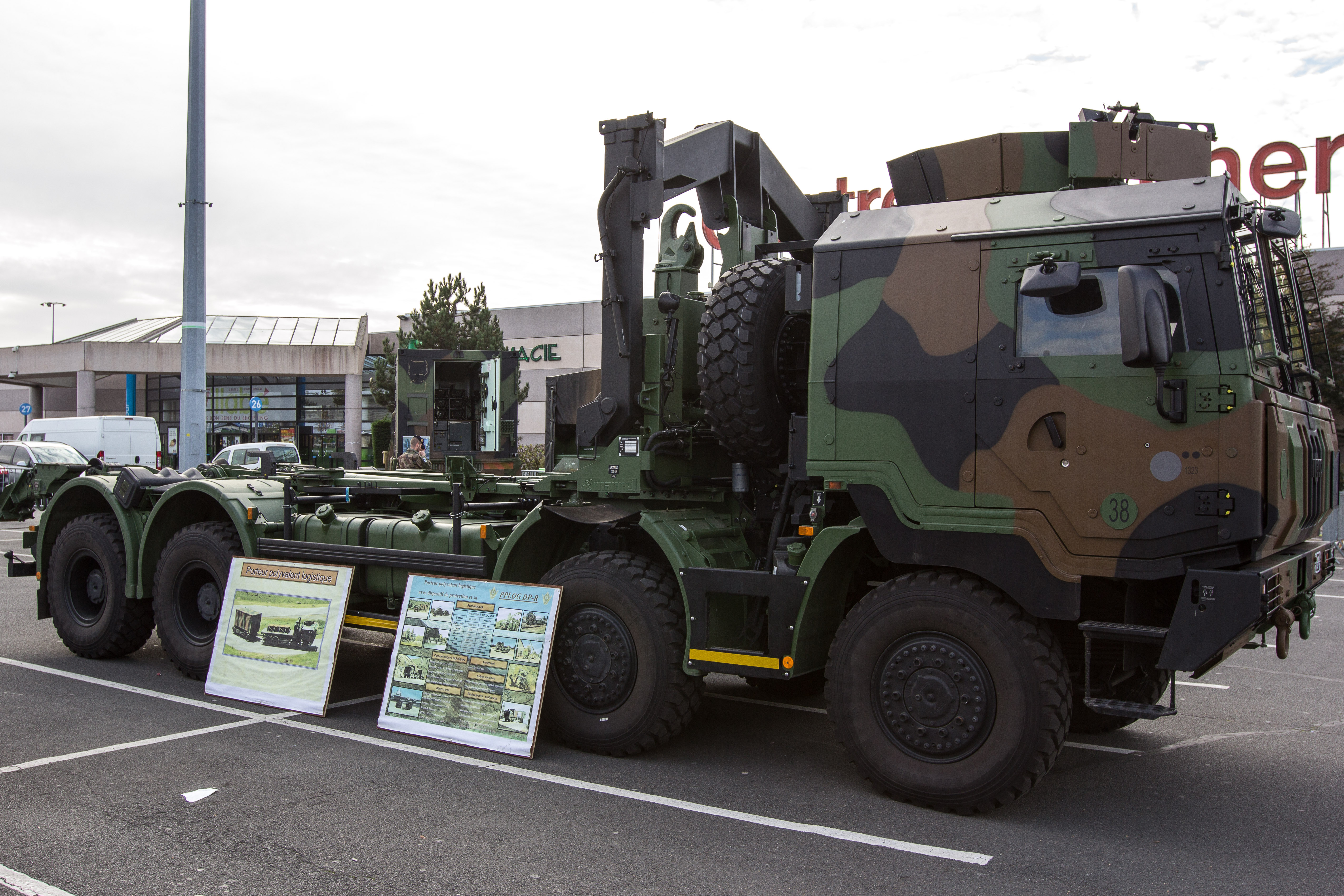 Un camion Porteur Polyvalent Terrestre PPLOG DP /Matériel présenté lors de l'exposition "Les forces armées s'invitent à villabé", du 23 au 25 octobre 2014 au Centre commercial Villabé A6 / Villabé / Essonne / France